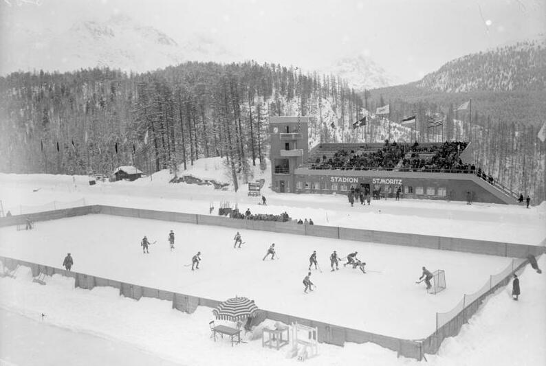 Winter in den Alpen! Blick in das Stadion von St. Moritz während eines internationalen Eishockeyspiels.